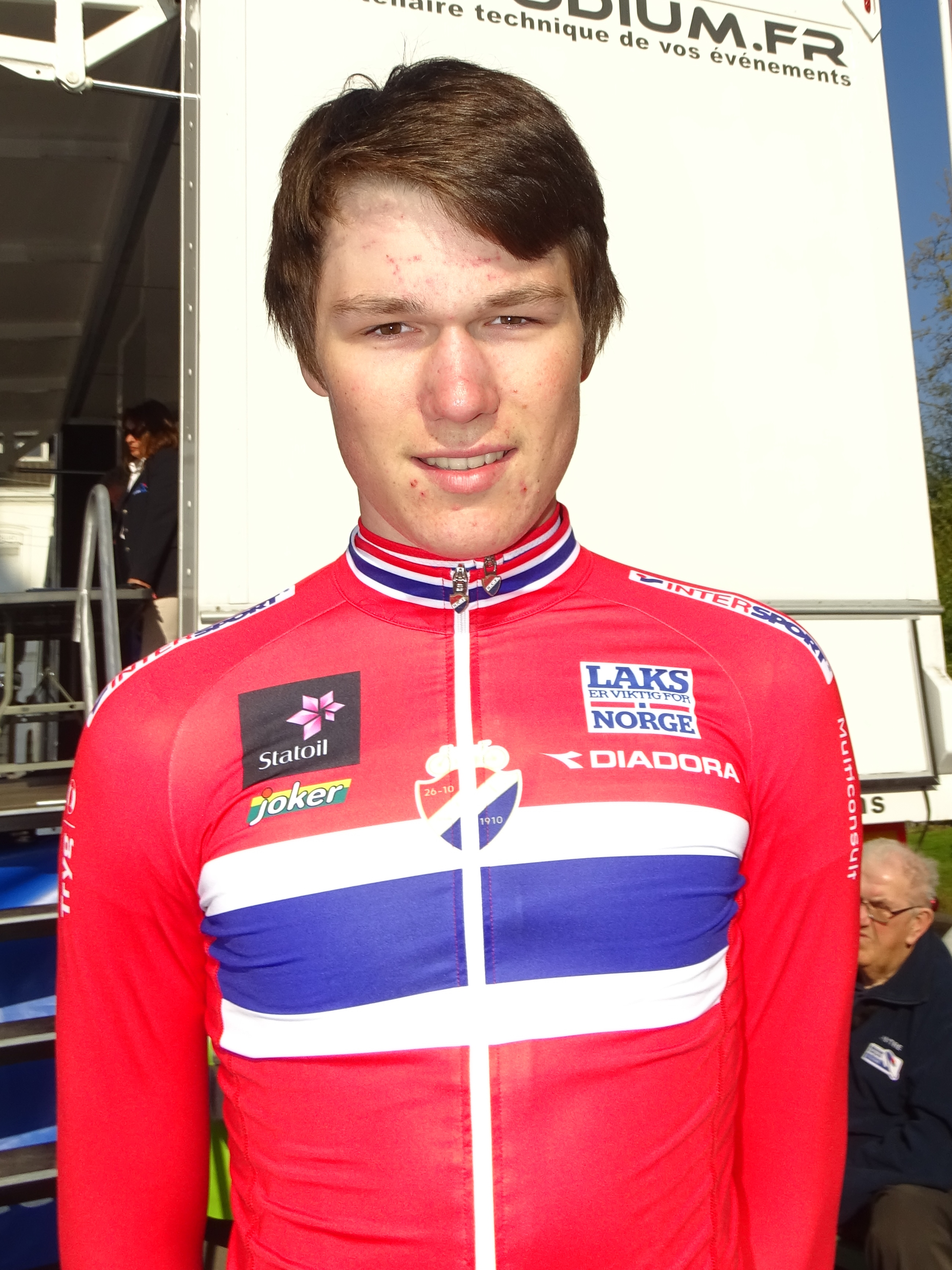 Reportage réalisé le dimanche 9 avril à l'occasion du départ du Paris-Roubaix juniors 2017 à Saint-Amand-les-Eaux, France.